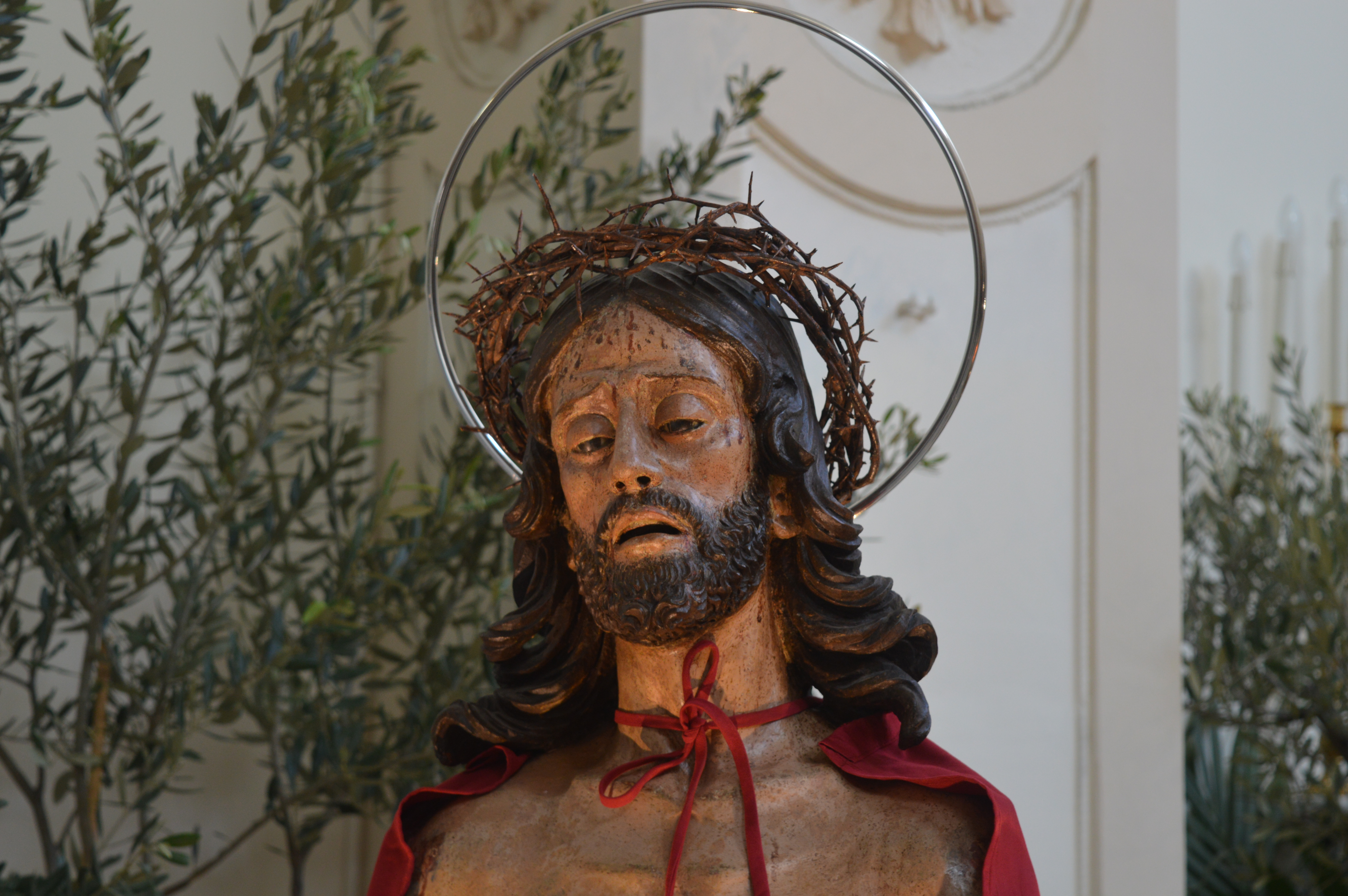 eccehomo